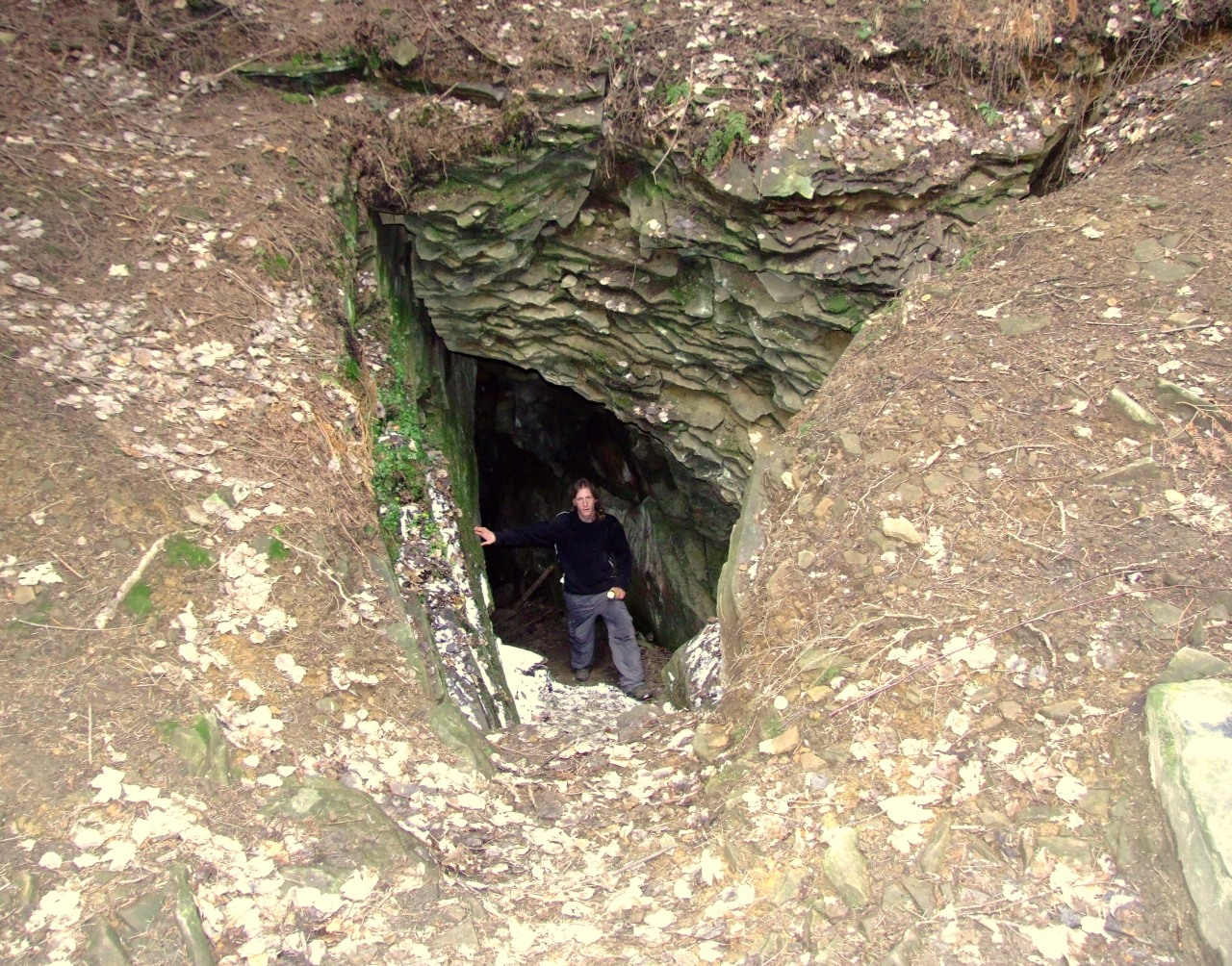 Jaskinia Zimna Dziura (Beskid Wyspowy)